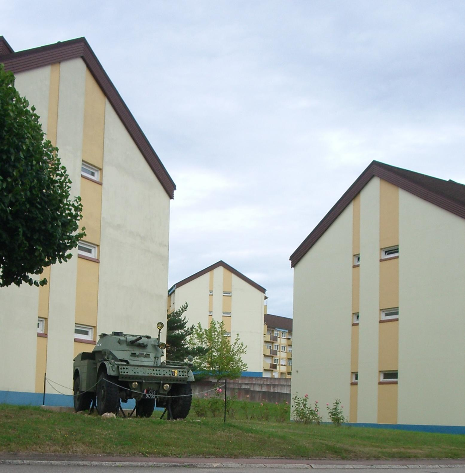 AML EGM 16/7